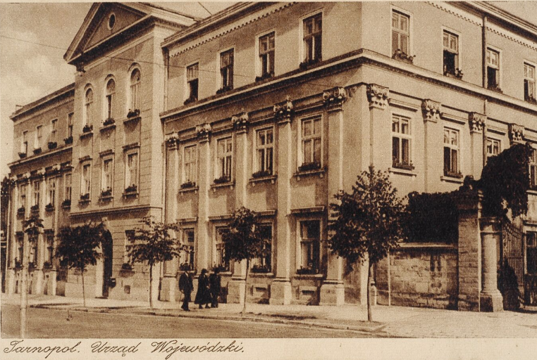 Будівля воєводства (обком партії, нині прокуратура), Тернопіль